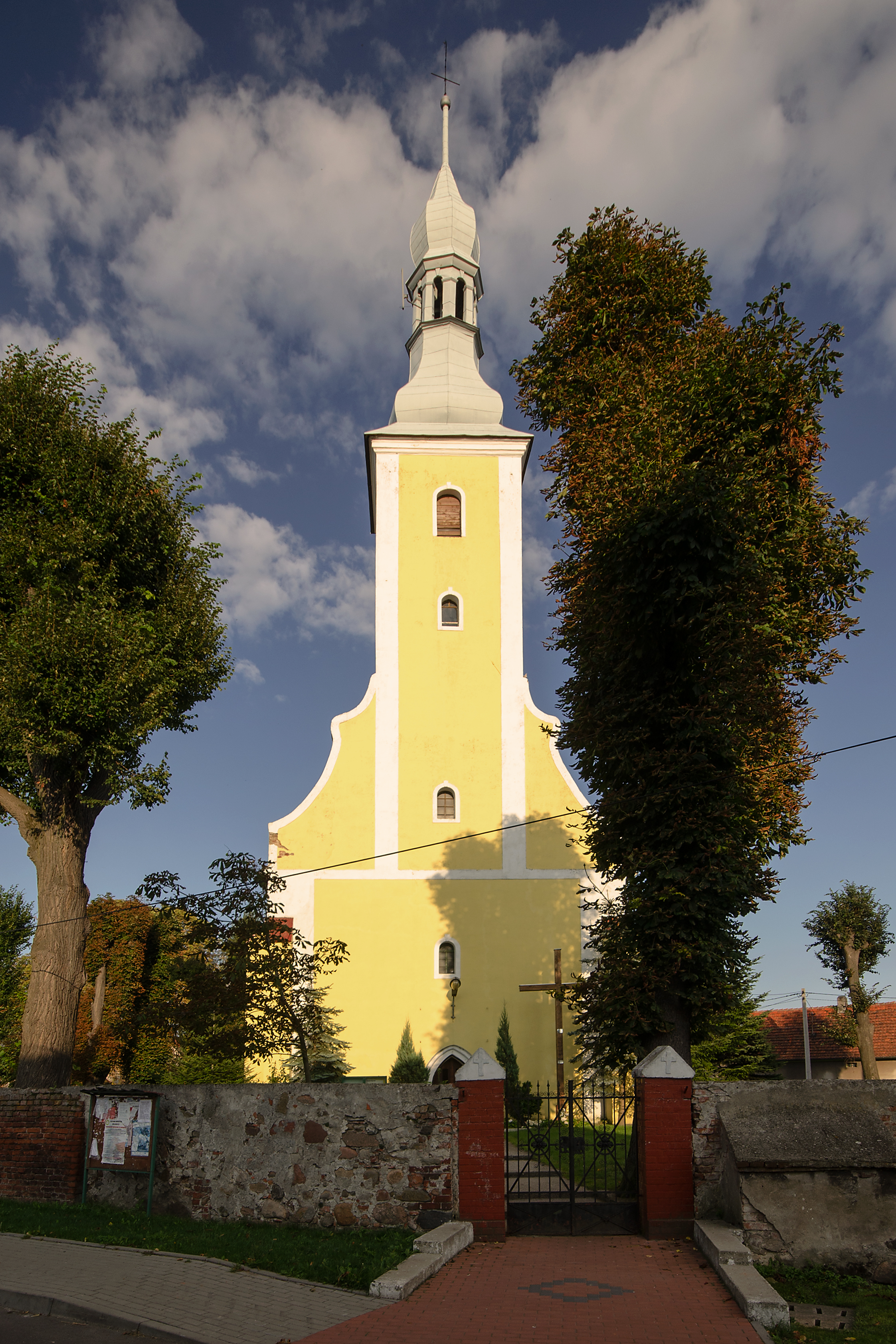 Czeska Wieś, kościół fil. p.w. Najświętszego Serca Pana Jezusa, 1310, XVIII